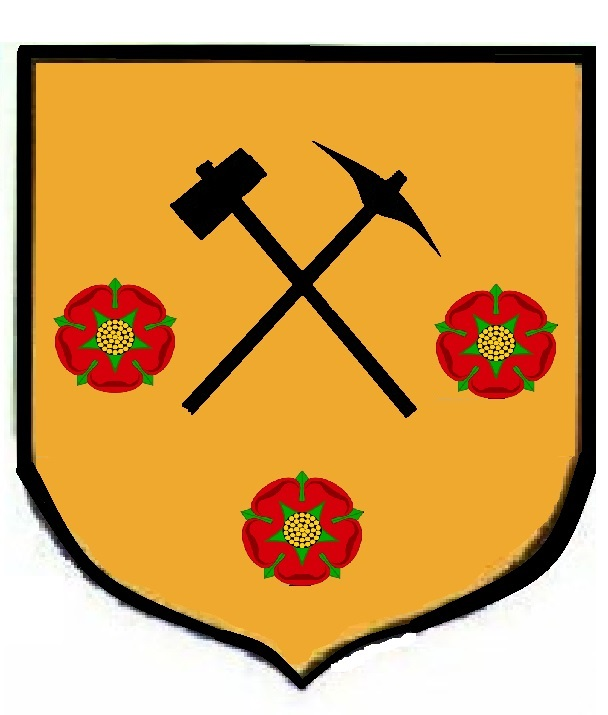 Herb wsi Miedzianka.